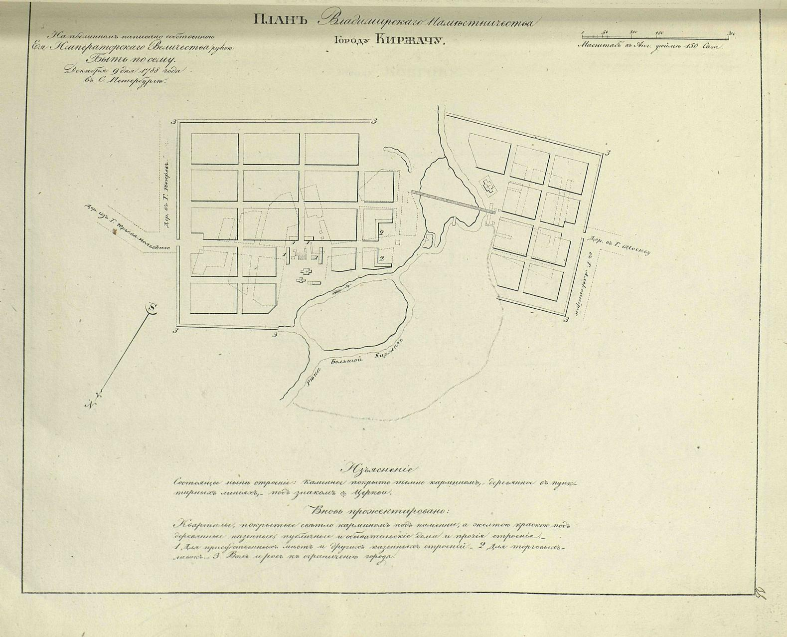 9 Декабря 1788 года Императрица Екатерина II утвердила план г. Киржач